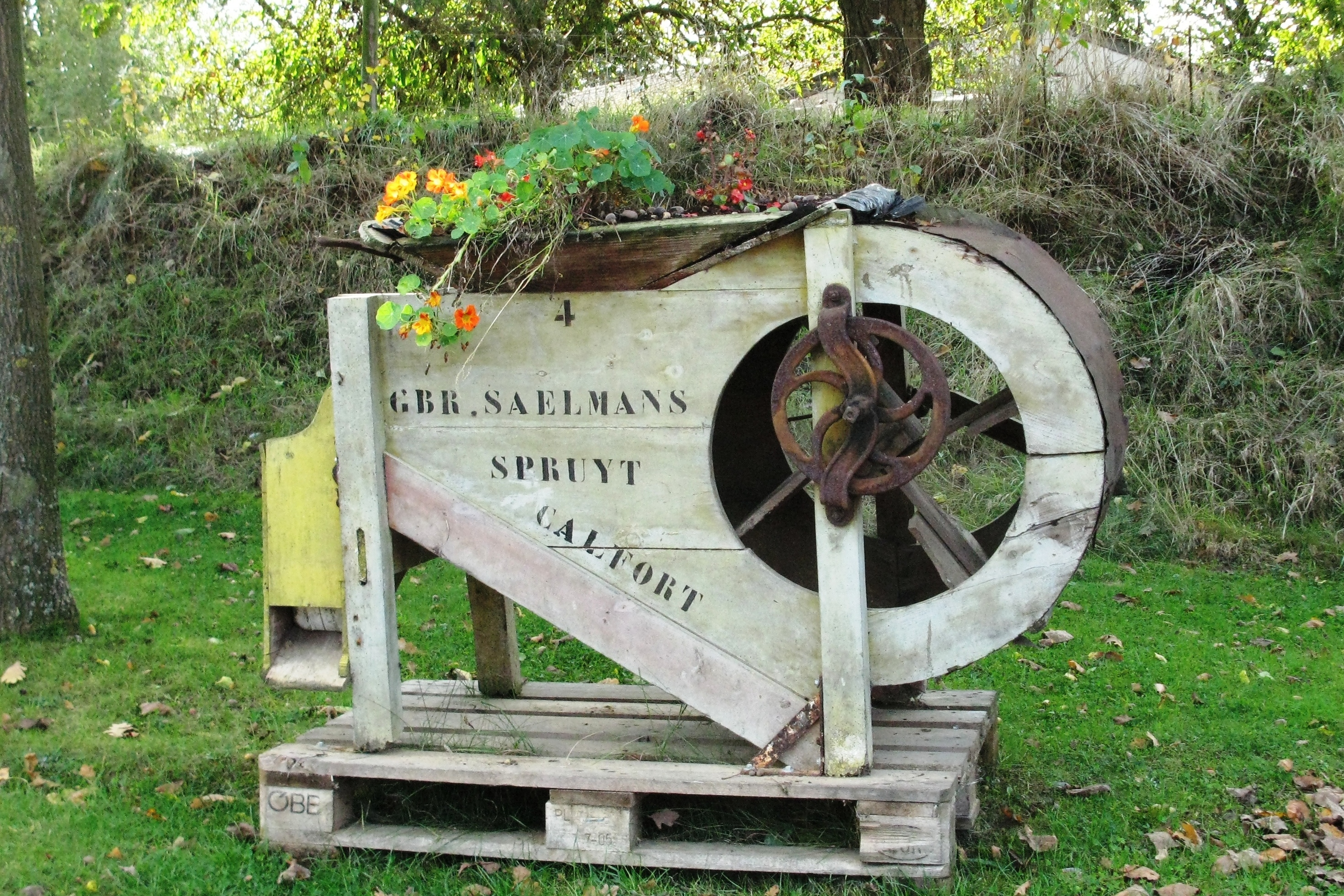 E Wand als Blummendëppen am Oktober 2009 zu Herstappe.